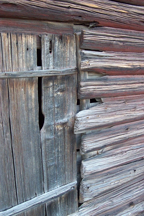 Inspräckt gåtspår i lada från 1790-talet i Forsen, Floda sn, Dalarna